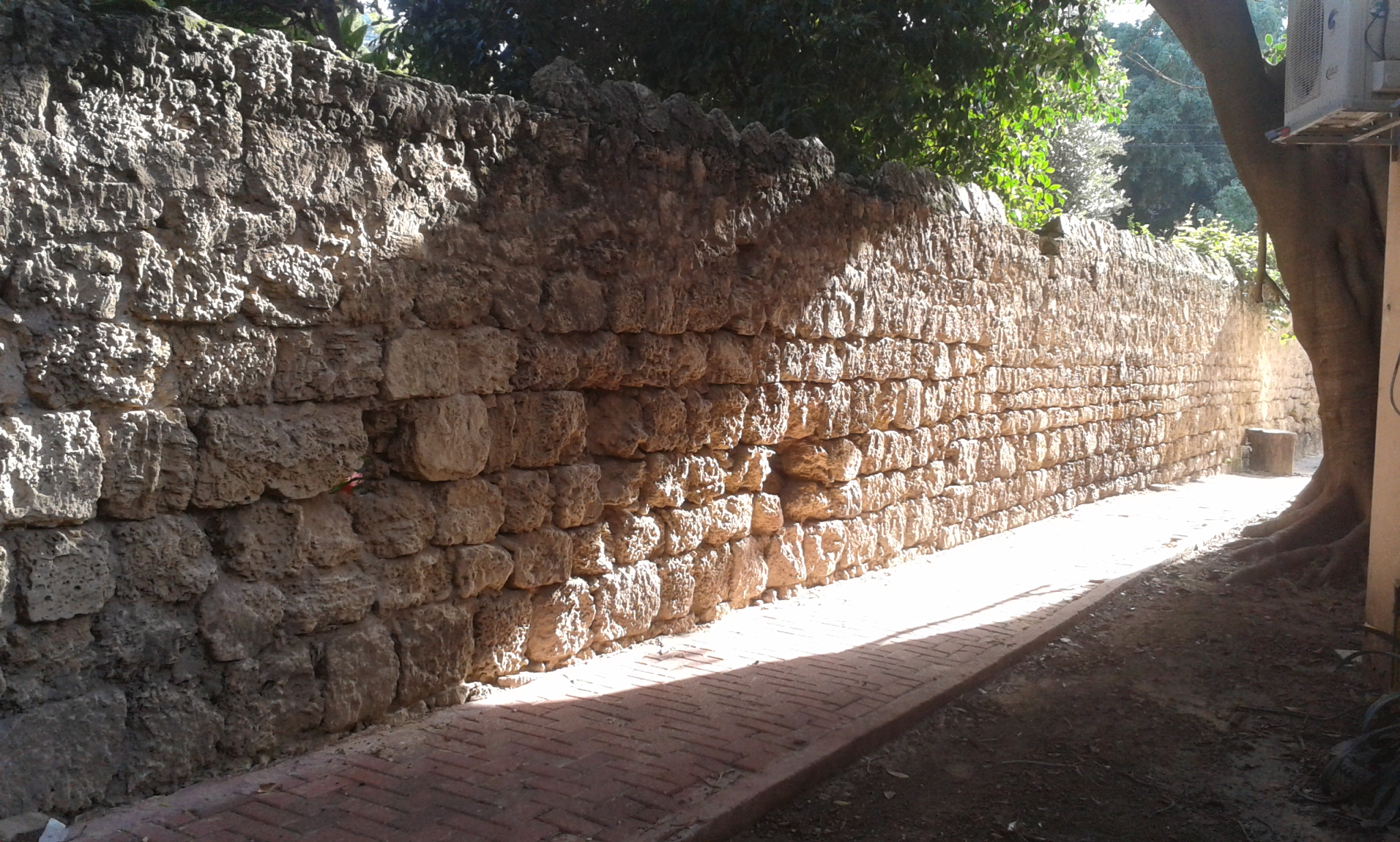 חומת חוות רוהאם - רחוב מזא"ה